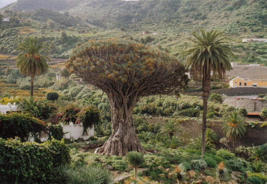 Kanarischer Drachenbaum in Icod de los Vinos (Original text: Der 600 Jahre alte Drachenbaum in Icod, Wahrzeichen von Teneriffa; Dezember 2003.)